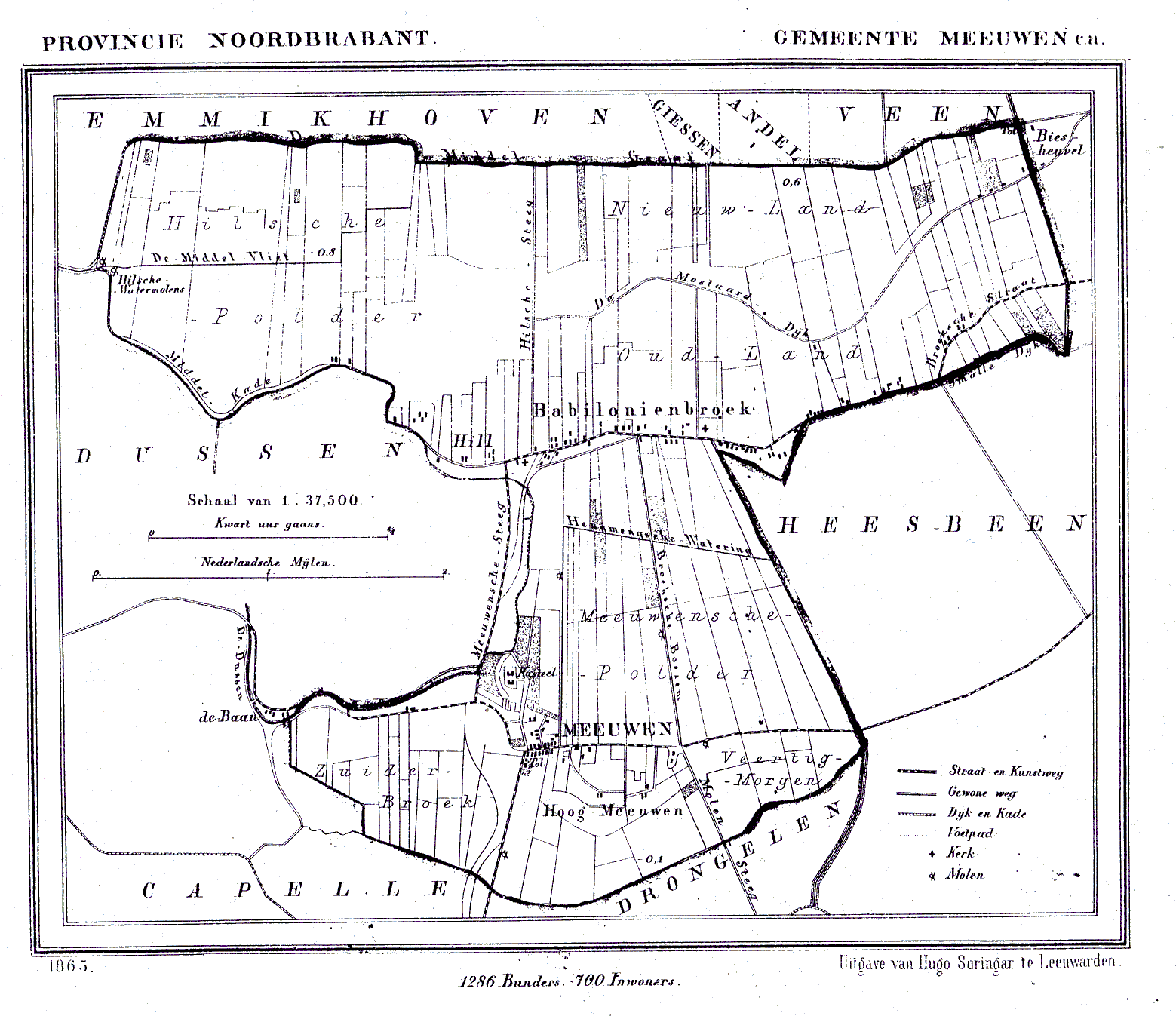 Nederland, Noord-Brabant, Gemeente Meeuwen